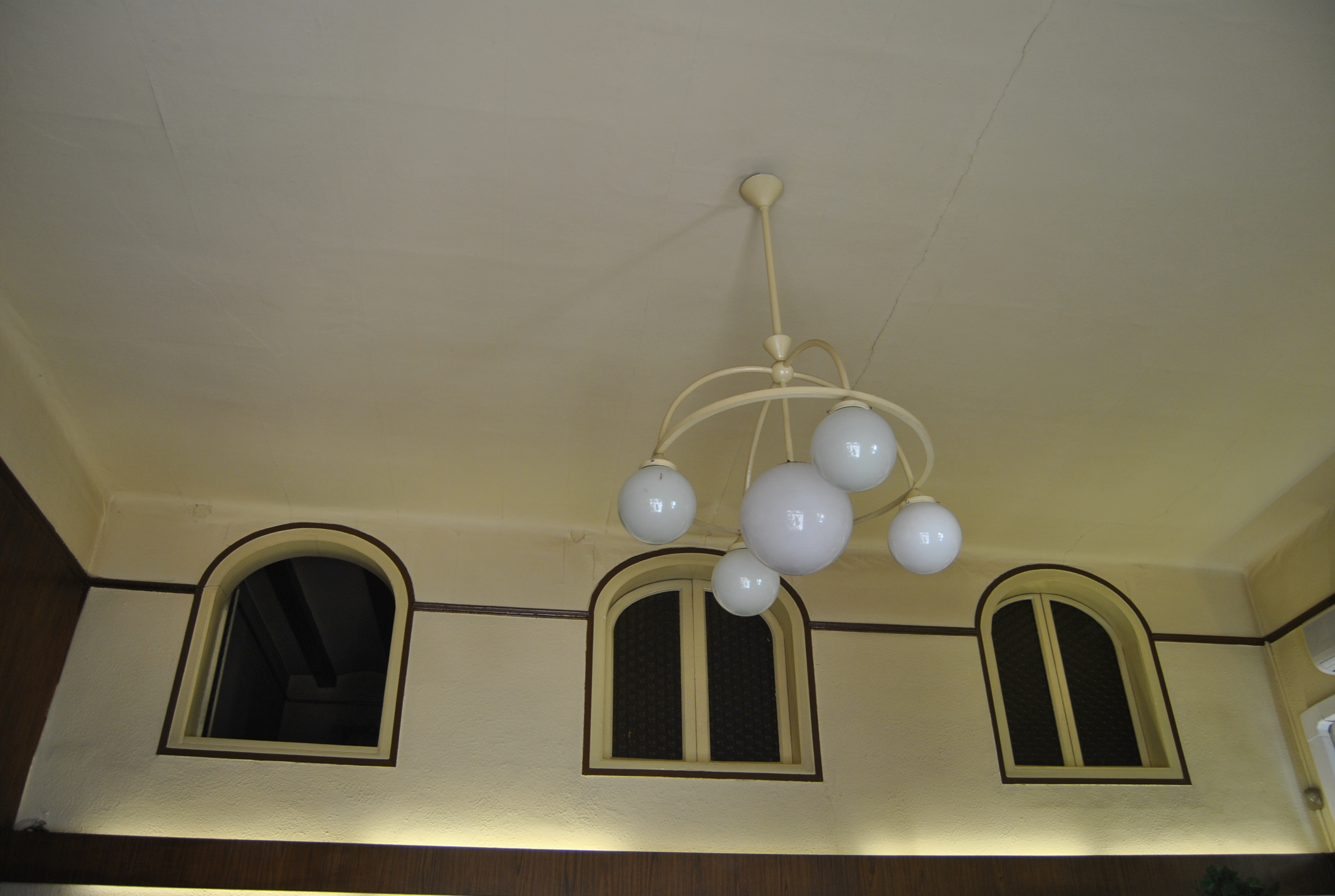 Globus de la Granja Vendrell